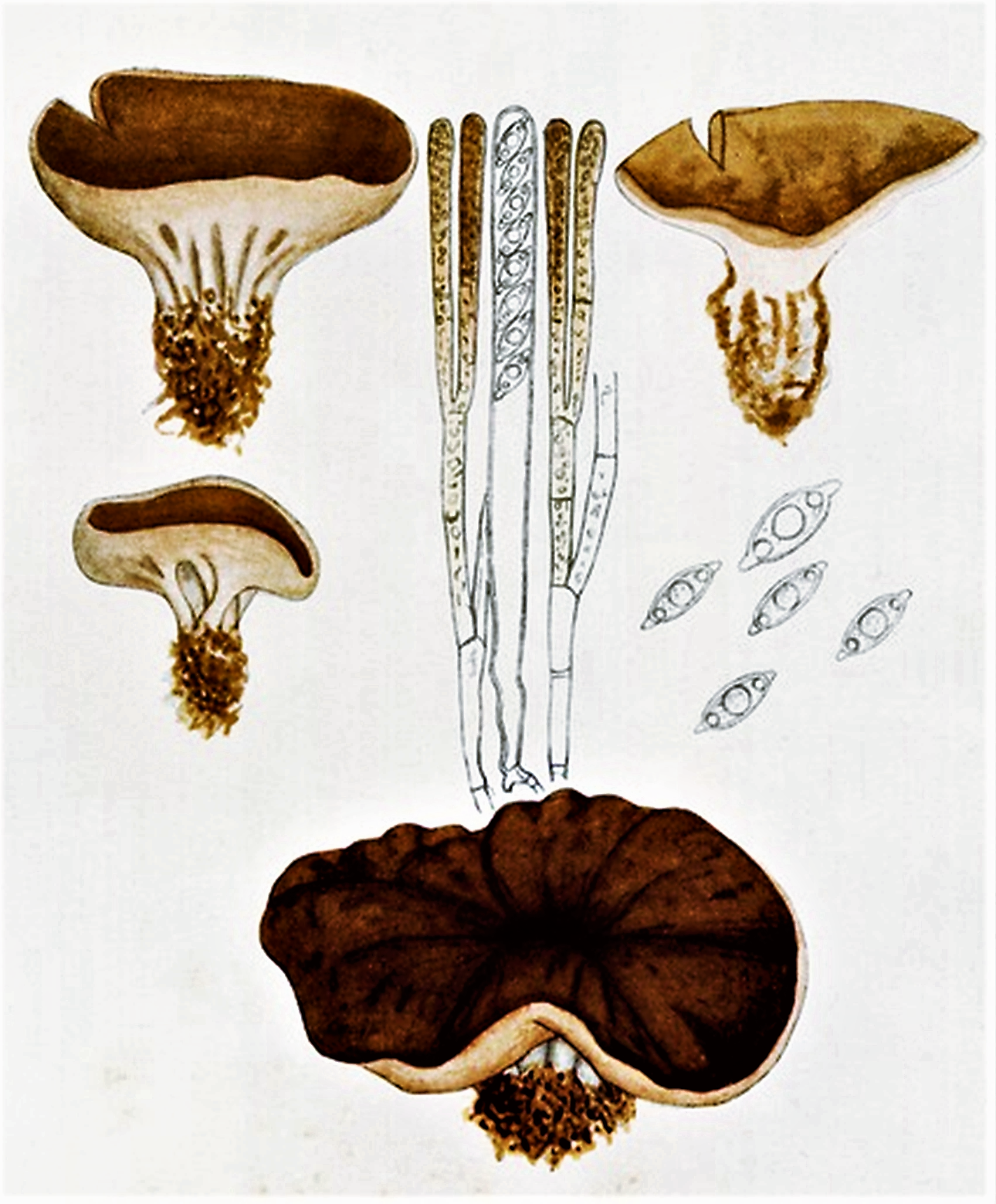 Bres.: Discina perlata (Fr., 1822) Fr. 1849, heute Discina ancilis (Pers., 1822) Sacc. (1889)